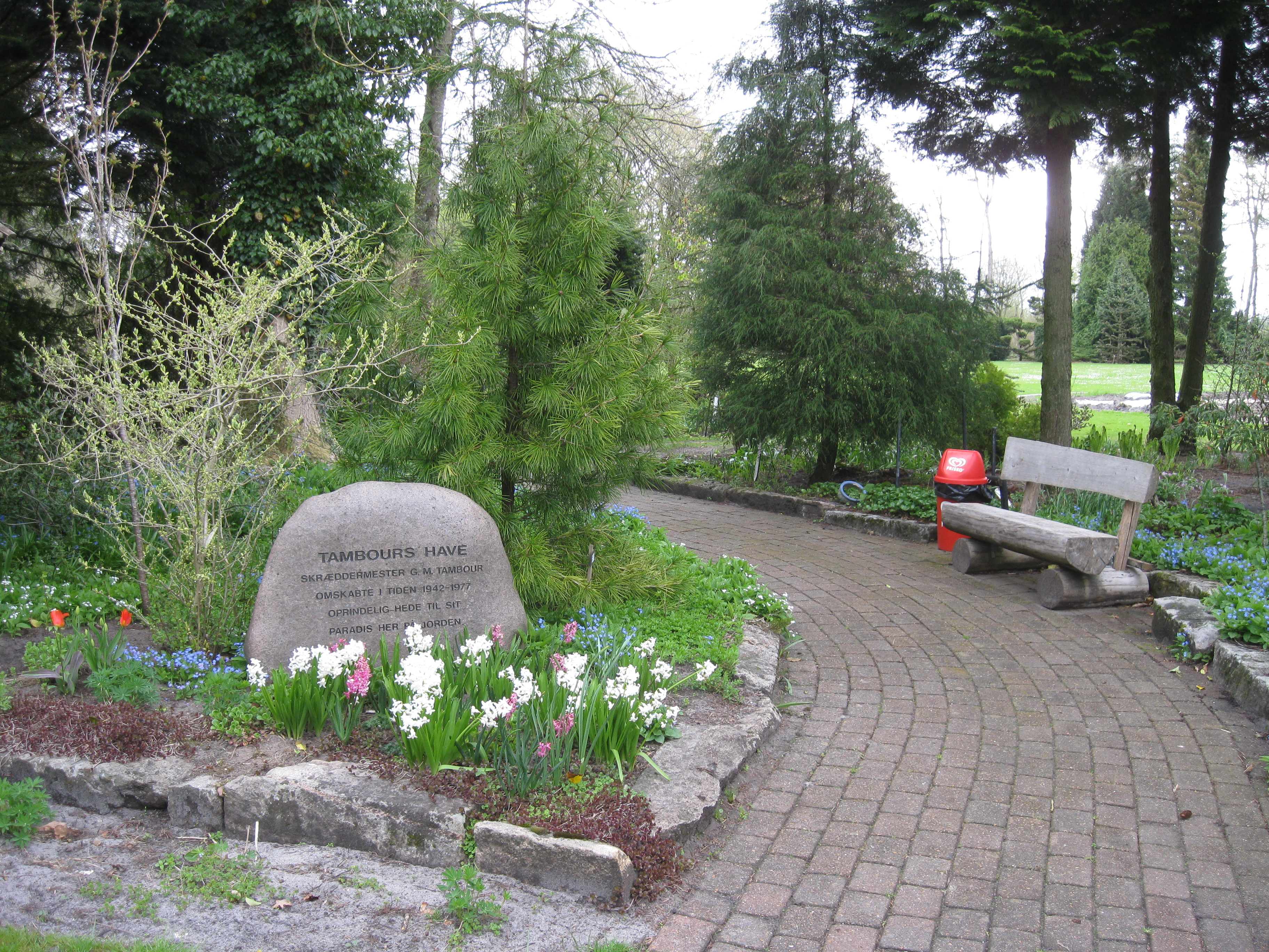 Tambours Have ved Karlsgårde Sø